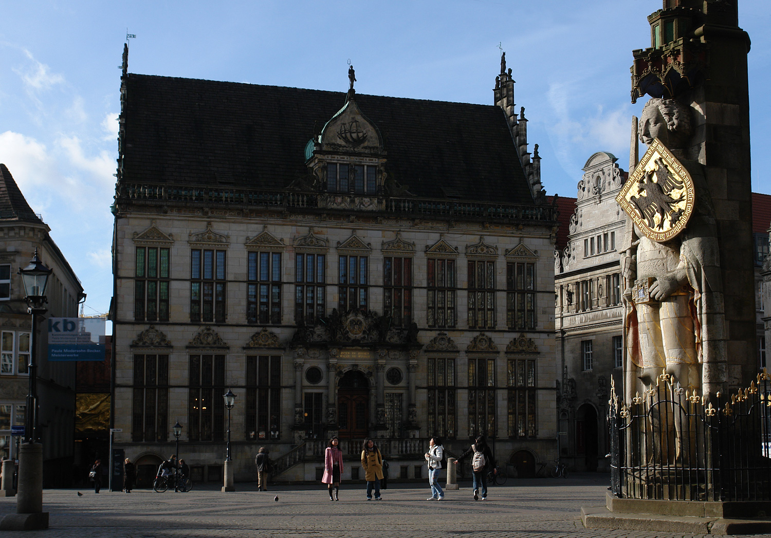 Haus Schütting am Bremer Marktplatz mit Roland